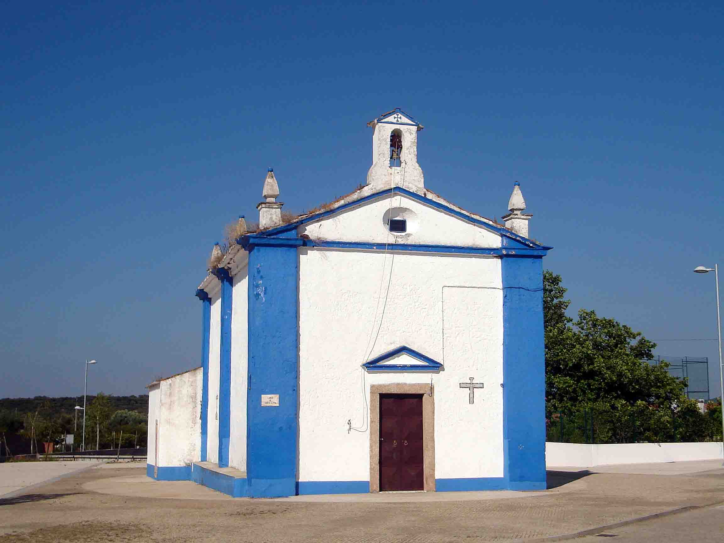 Igreja de Santa Clara no Sabugueiro